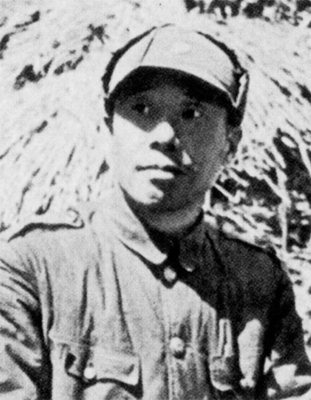 国民革命军第七十三军军长韩浚于1947年2月的莱芜战役中被解放军俘虏